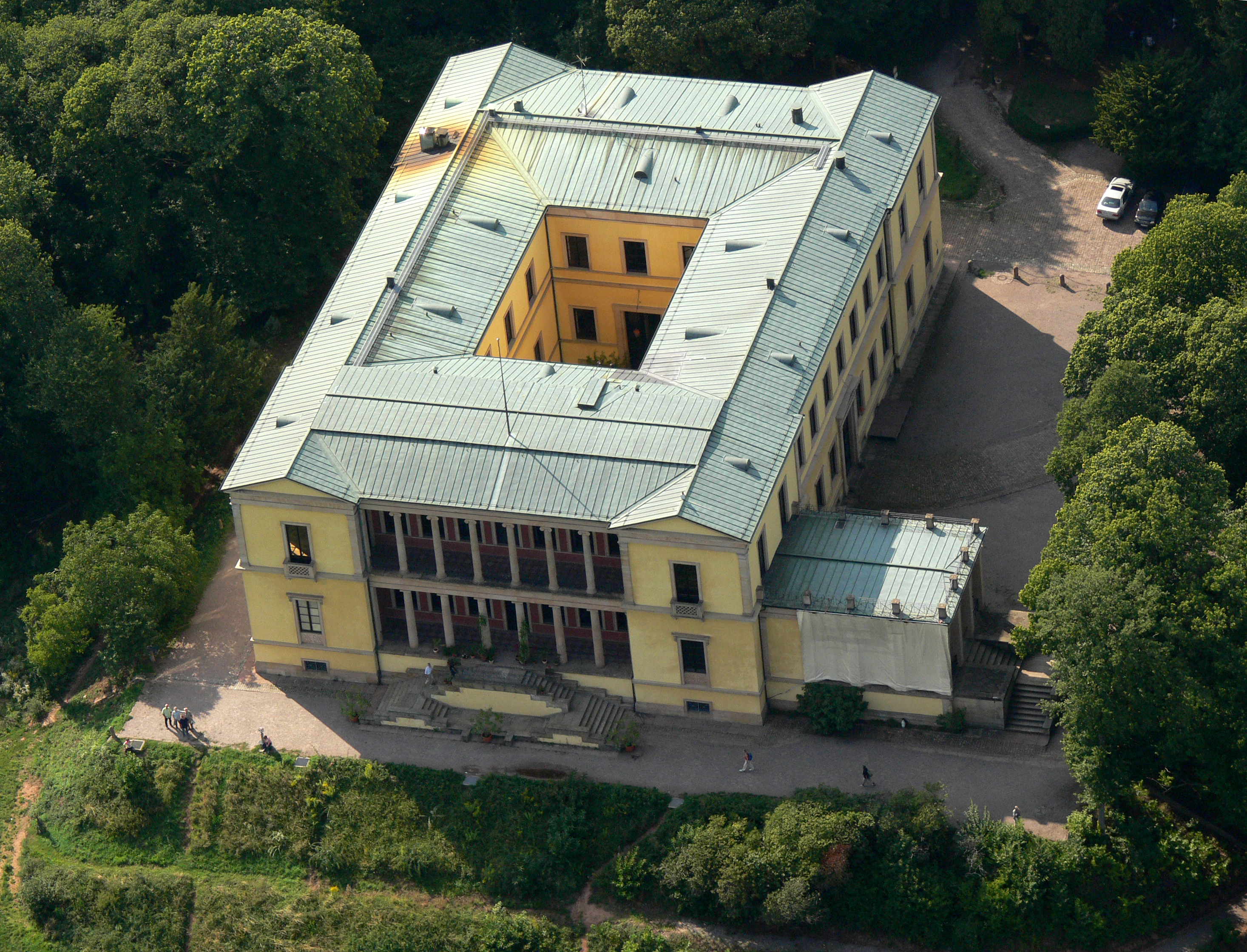 Villa Ludwigshöhe, Luftaufnahme